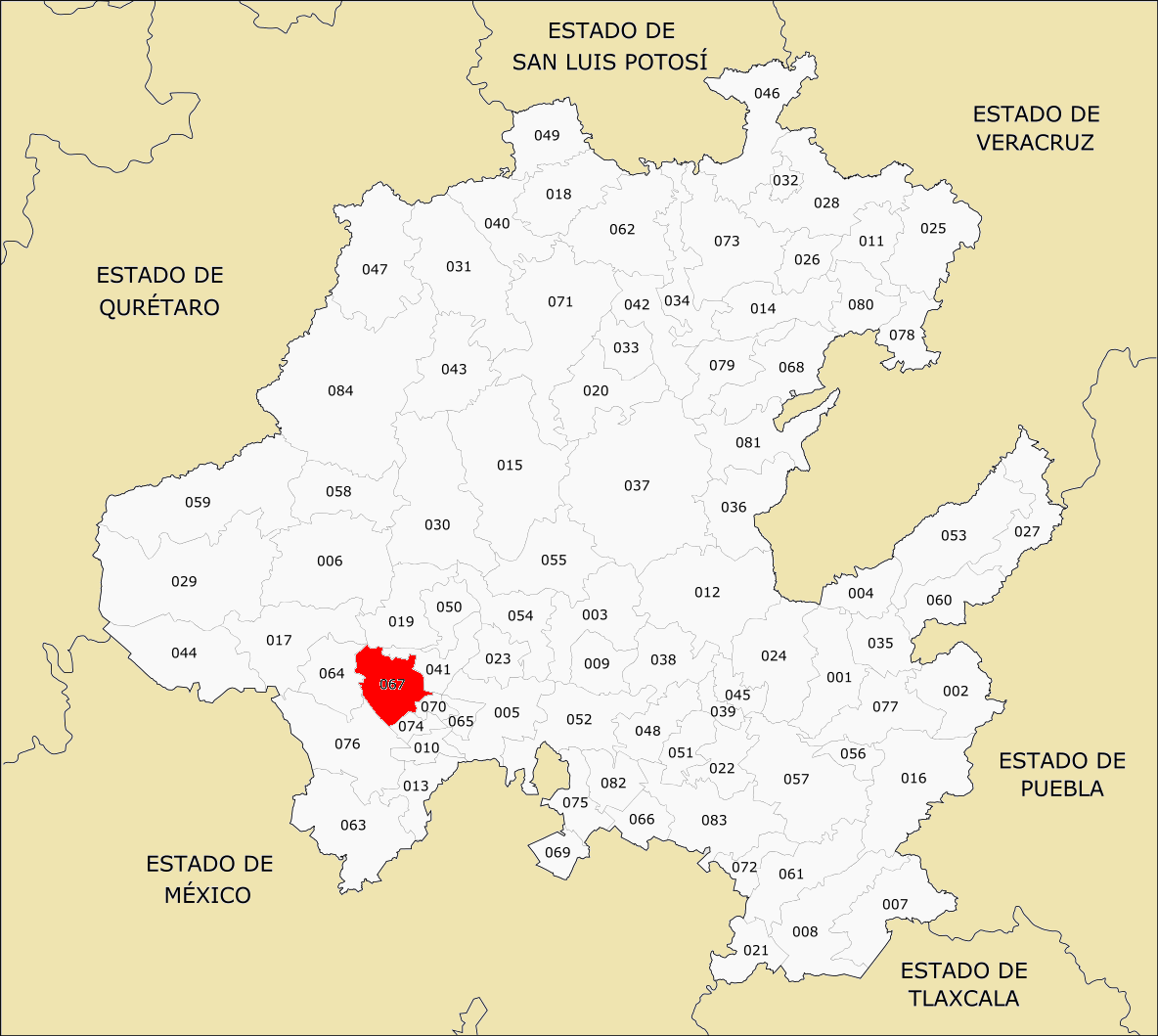 Municipios de Hidalgo